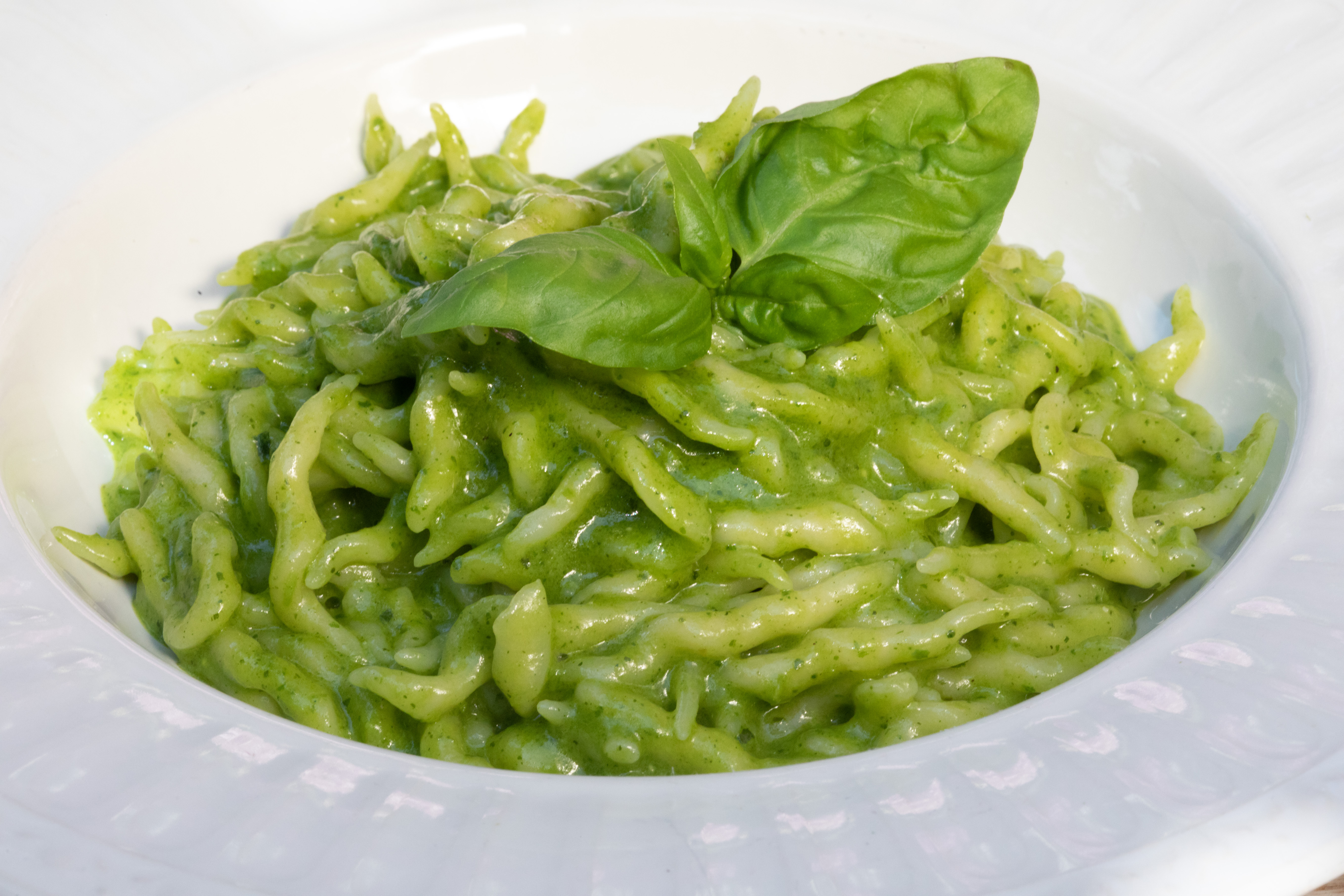 Piatto di Trofie al pesto